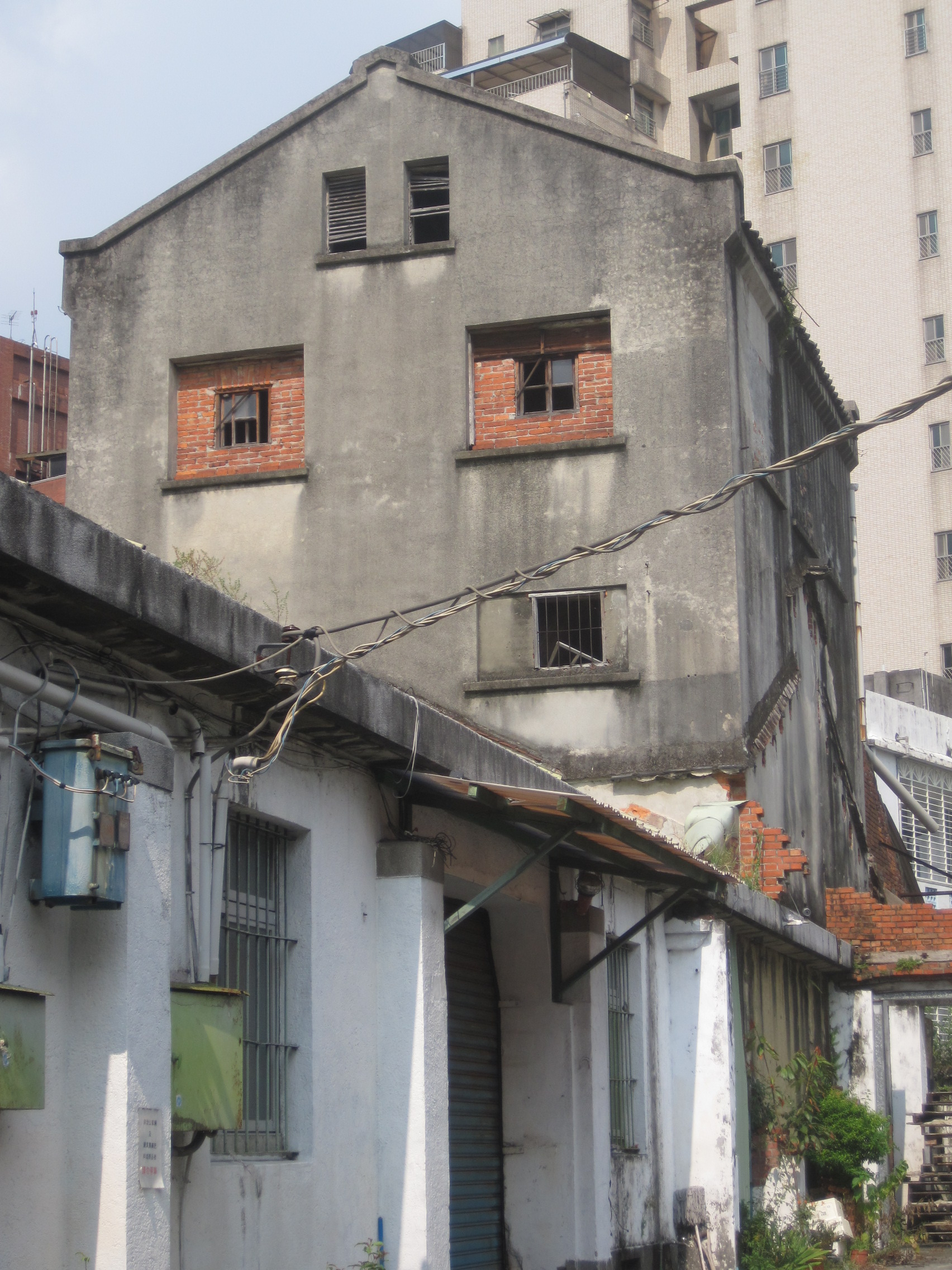 北投穀倉，臺北市文化資產。